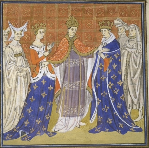 Le pape Jean XXII annulant le mariage de Charles IV le Bel, roi de France (1322-1328), et de sa première épouse Blanche de Bourgogne.